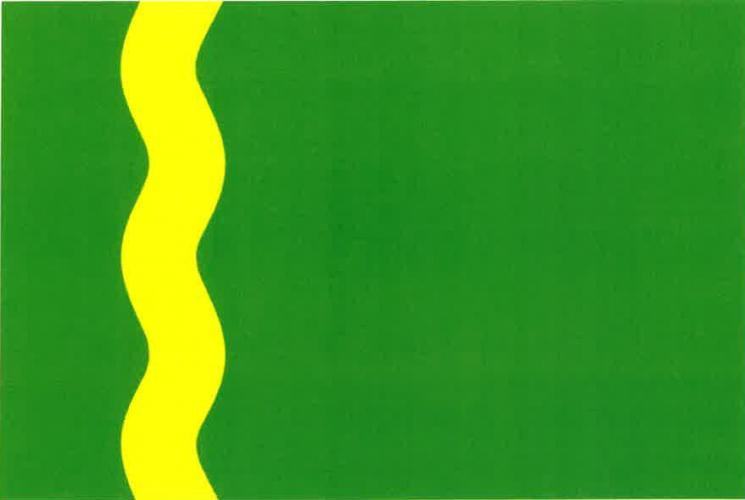 vlajka, Nový Jimramov, okres Žďár nad Sázavou